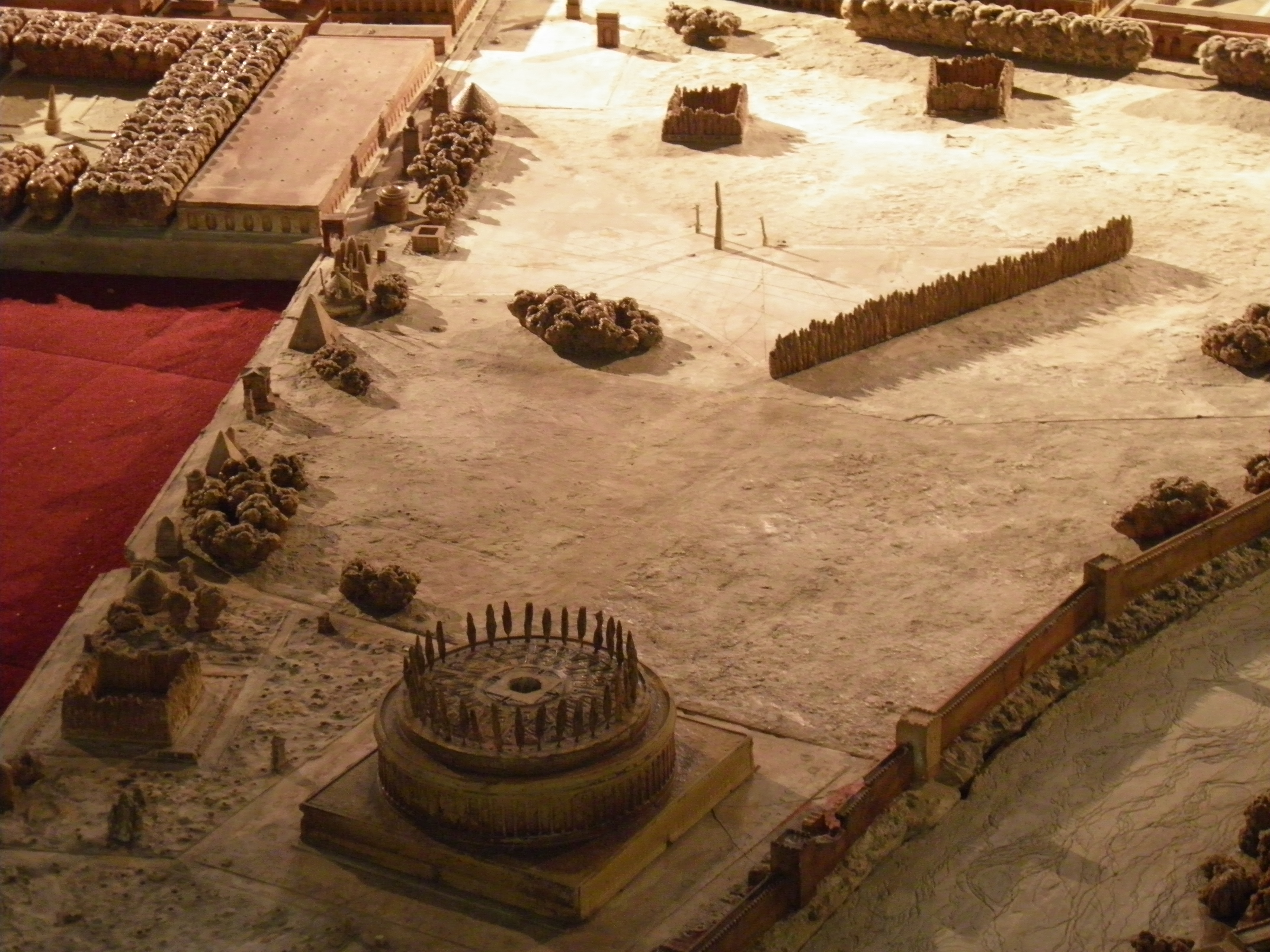 Mausolée d'Auguste et limites de la maquette, plan de Rome de Paul Bigot, Caen MRSH